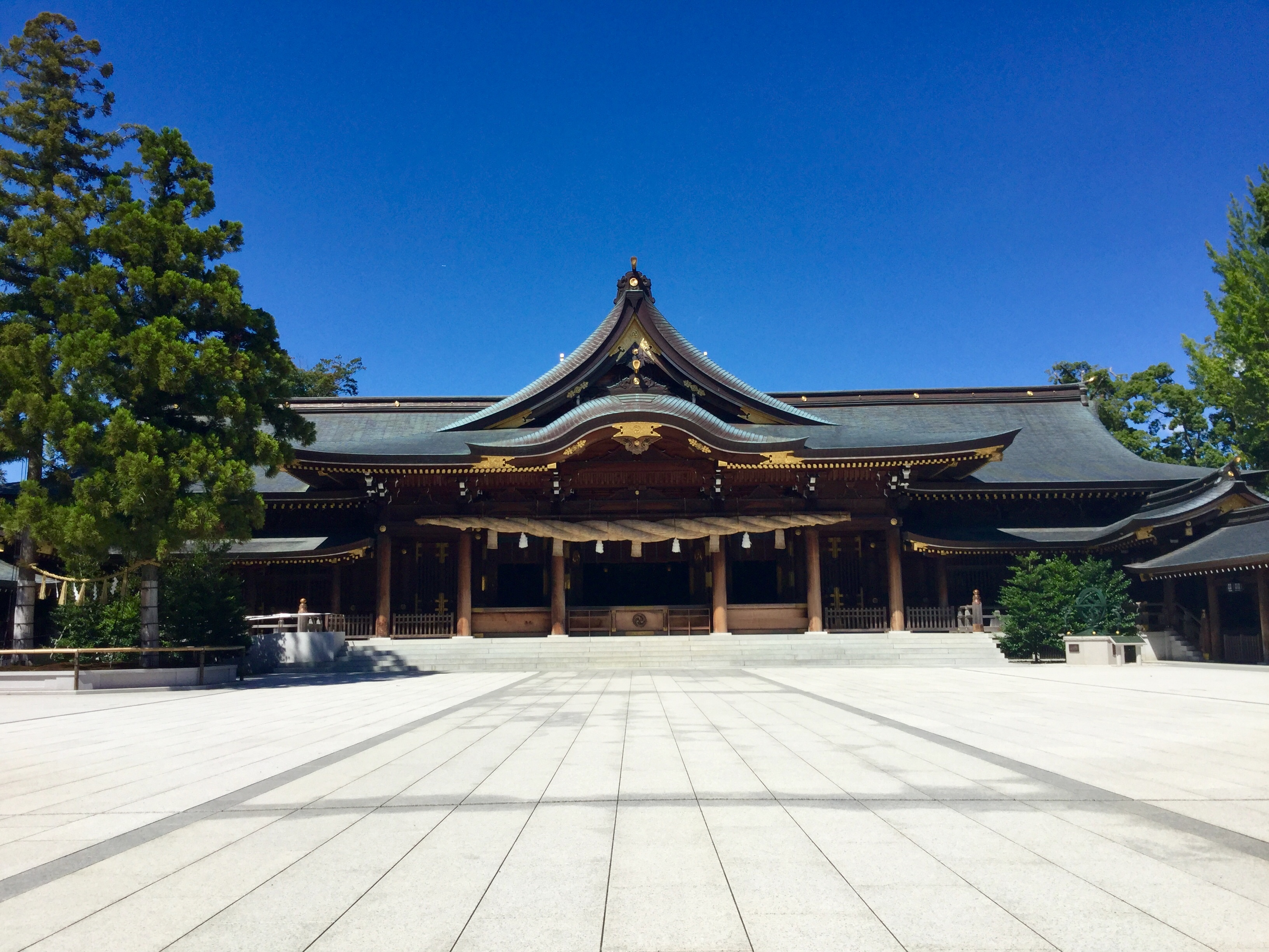 寒川神社の御社殿(拝殿)